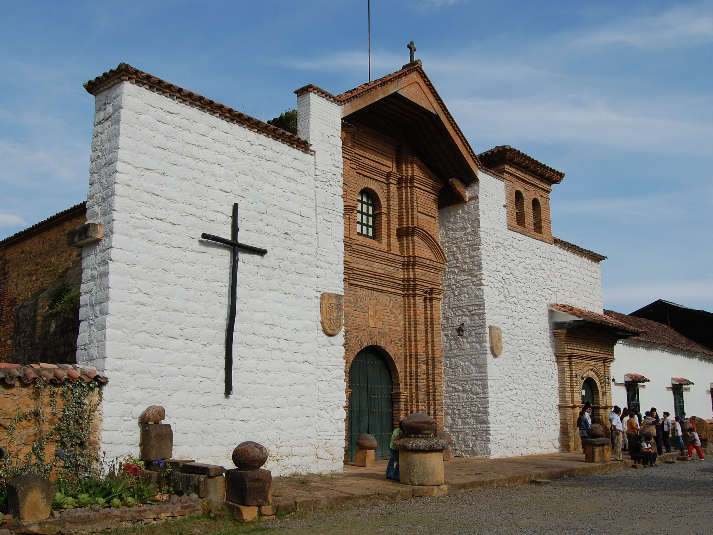 Monasterio Santo ecce-homo, Villa de Leyva, Boyacá, Colombia